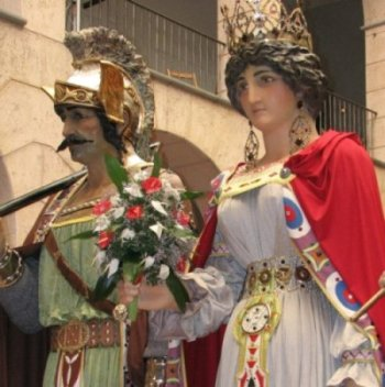 Foto del Gegant i la Gegantessa d'Olot